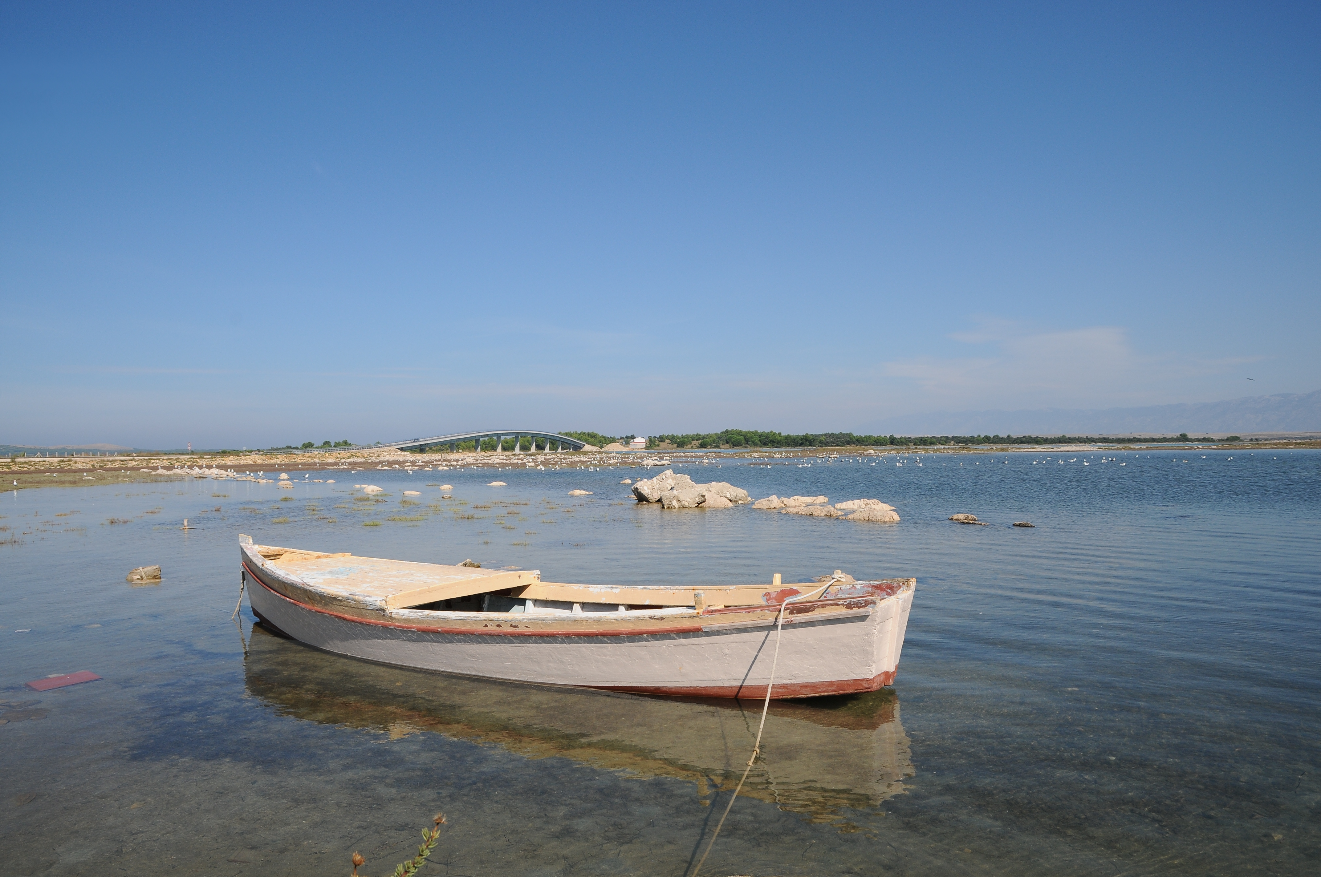 Fischerboot bei Privlaka (Dalmatien). Im Hintergrund die Brücke nach Vir Kroatien).